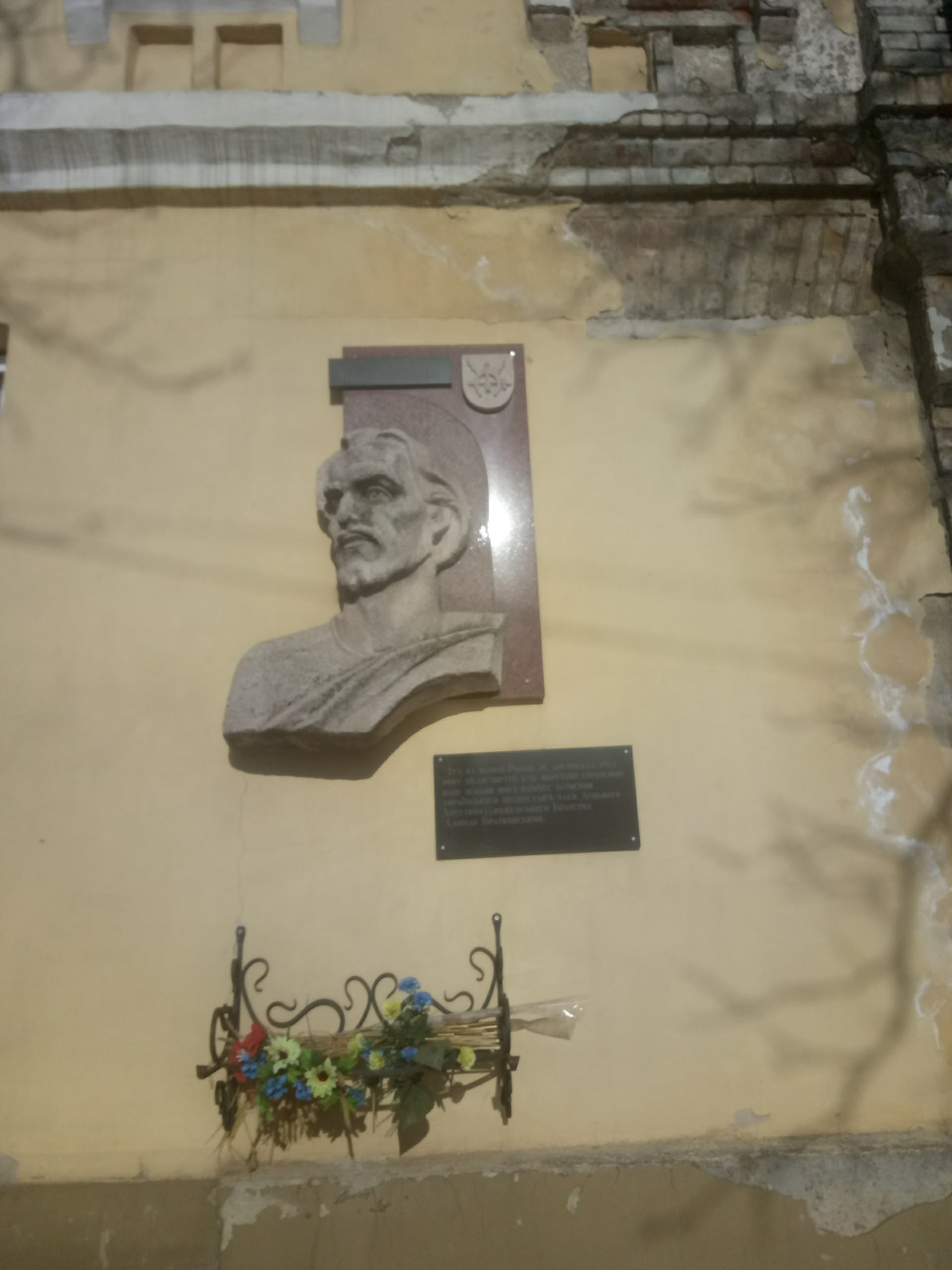 пам'ятна дошка в Луцьку на честь Данила Братковського